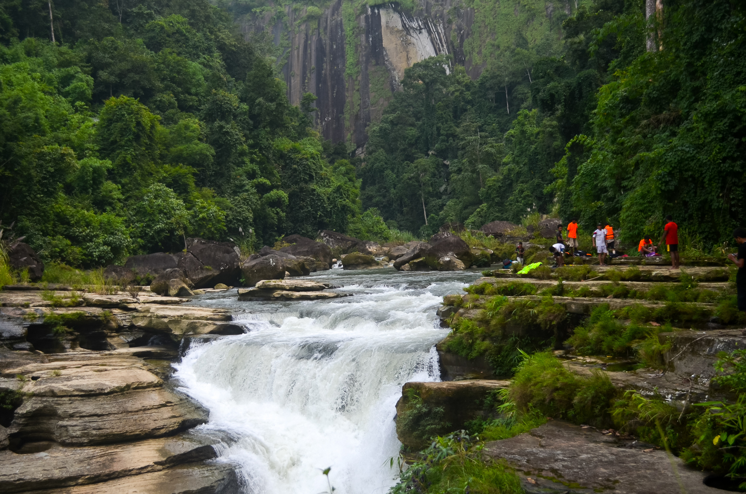 বান্দরবানের থাঞ্চি উপজেলার গহীনে অবস্থিত আমিয়াখুম ঝর্ণা। দুর্গম রাস্তা পাড়ি দিয়ে যেতে হয় এখানে। থাঞ্চি থেকে রেমাক্রি হয়ে জিনাপাড়া। সেখান থেকে অতিরামপাড়া হয়ে আসতে হয় আমিয়াখুমে।